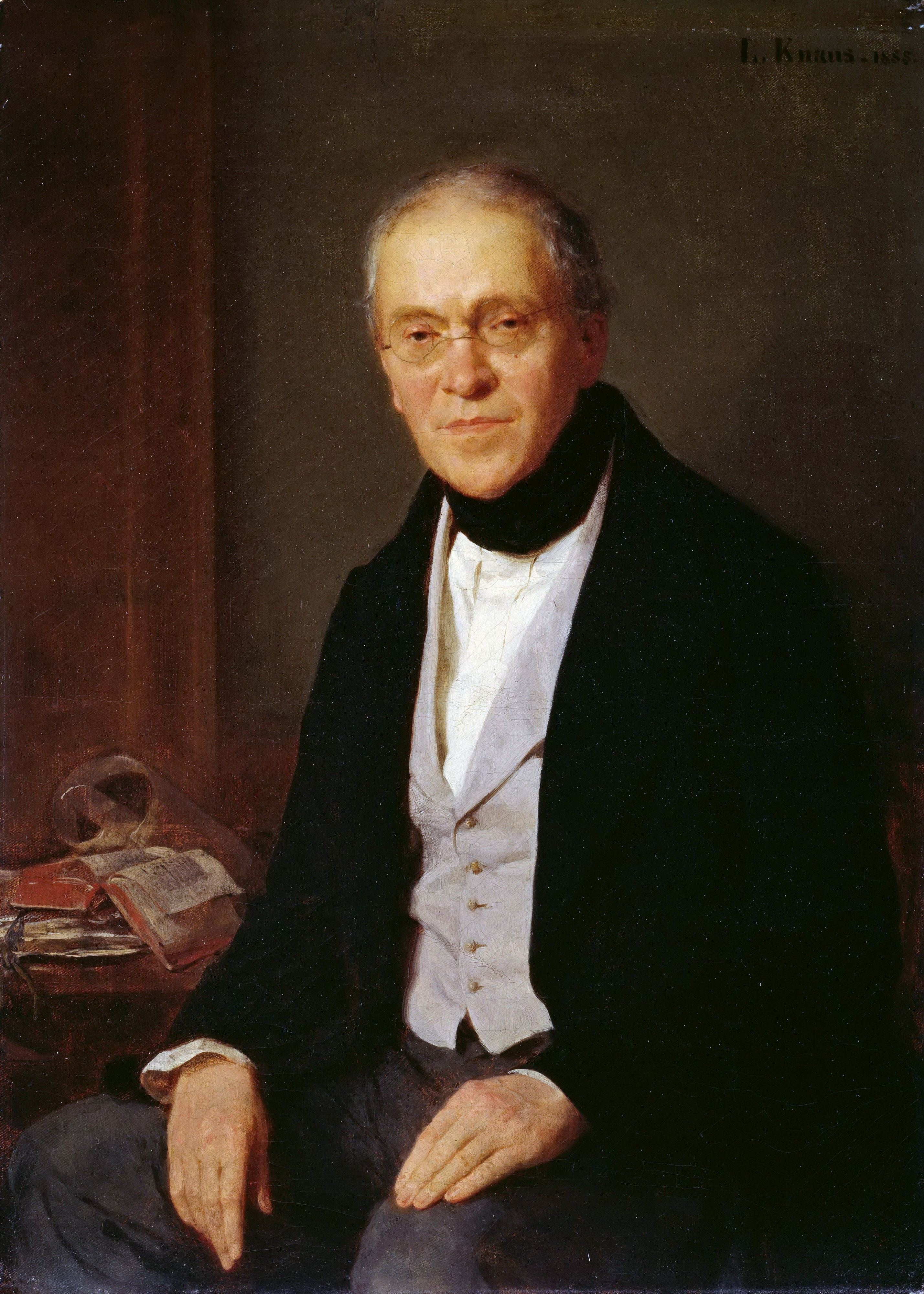 Gustav Friedrich Waagen, Kunsthistoriker und erster Direktor der Berliner Gemäldegalerie (1794-1868).